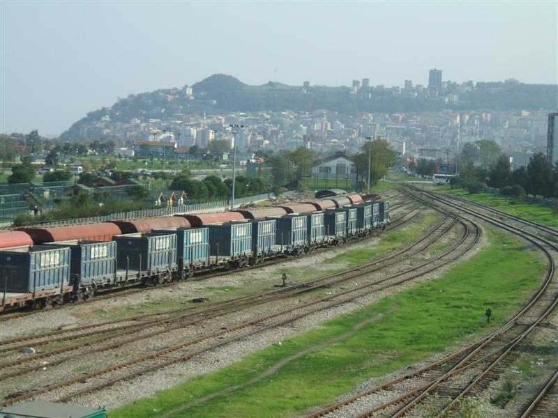 Samsun TCDD